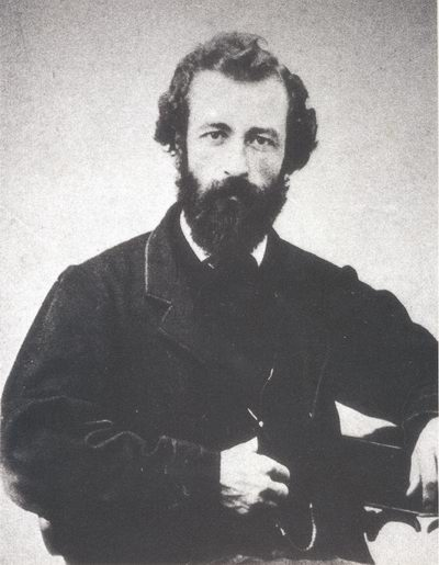 Italian naturalist Giovanni Canestrini (1835-1900)